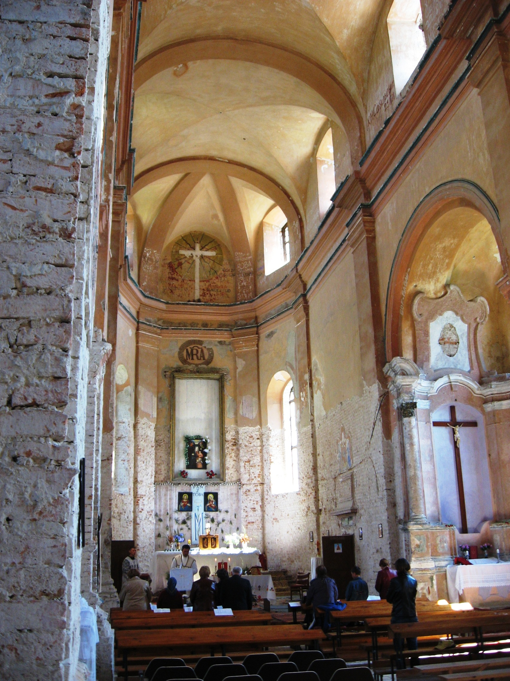 Клевань. Головний неф Благовіщенського костелу